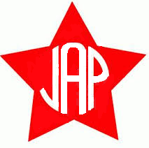 Estrella de la JAP